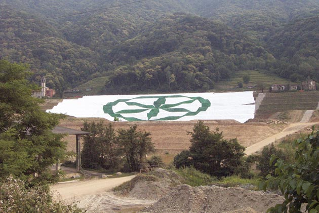 Bandiera della Padania, entrata nel Guinness World Record 2005 come bandiera più grande al mondo: 170x100 metri.